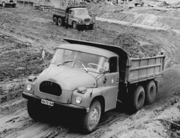 Rachlau, Bau eines Wasserspeichers ADN-ZB Häßler 9.7.75 Bez. Dresden: 240.000 m³ Beregnungswasser für 200 ha landwirtschaftliche Nutzfläche werden später in diesem Wasserspeicher gesammelt, den Werktätige des VEB Meliorationsbau Dresden gegenwärtig in Rachlau, Kreis Bautzen, errichten. Mit dem Bau von Be- und Entwässerungsanlagen, Betonwirtschaftswegen, Flußbefestigungen, Vorflutern und Landwirtschaftsbauten leisten die Meliorationstechniker dieses Betriebes einen wichtigen Beitrag zur Intensivierung der Agrarproduktion im Bezirk.